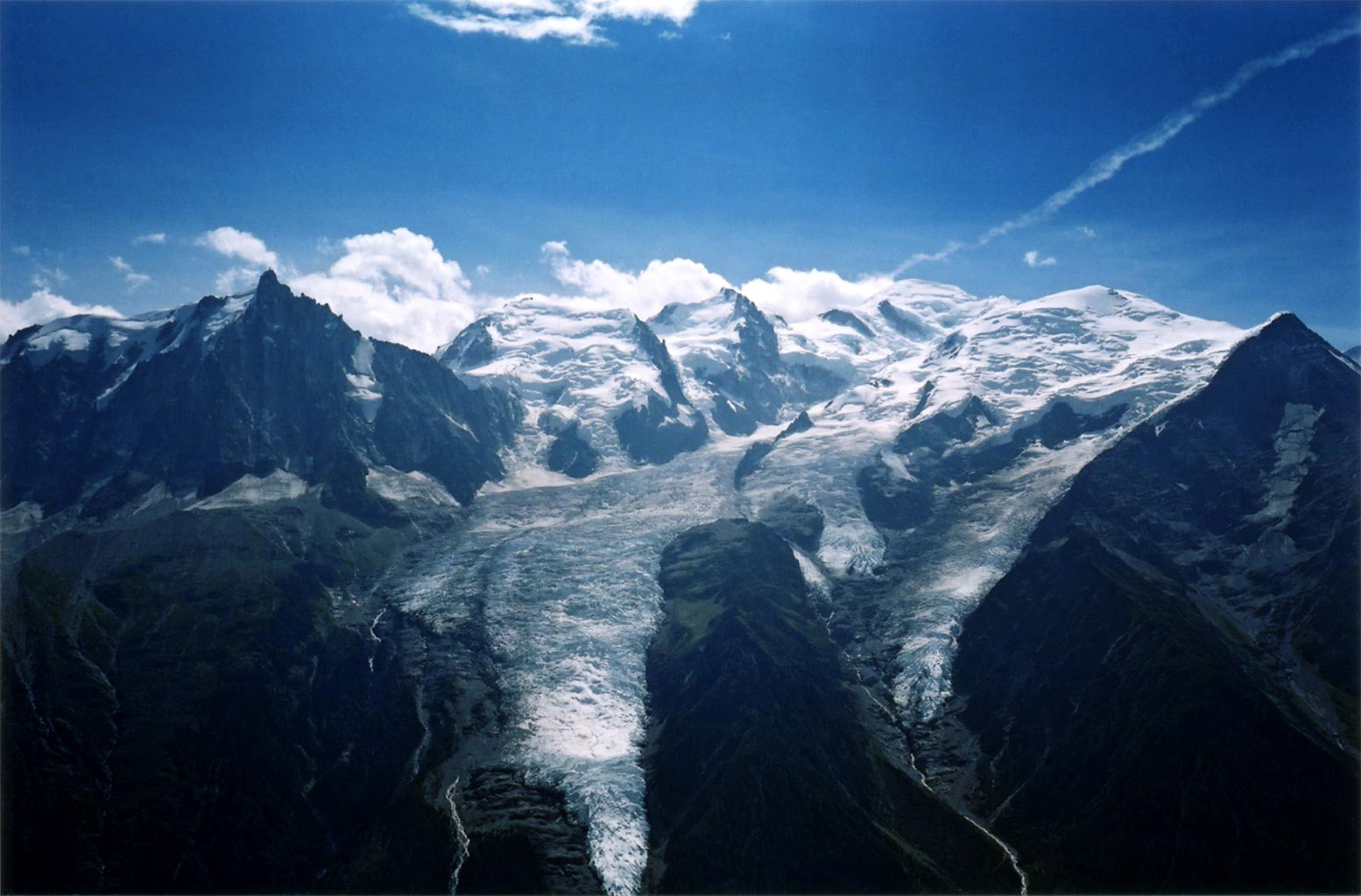 Massif du Mont-Blanc vue générale depuis le sud du Brévent Photo par Meanos (Août fr:2003)